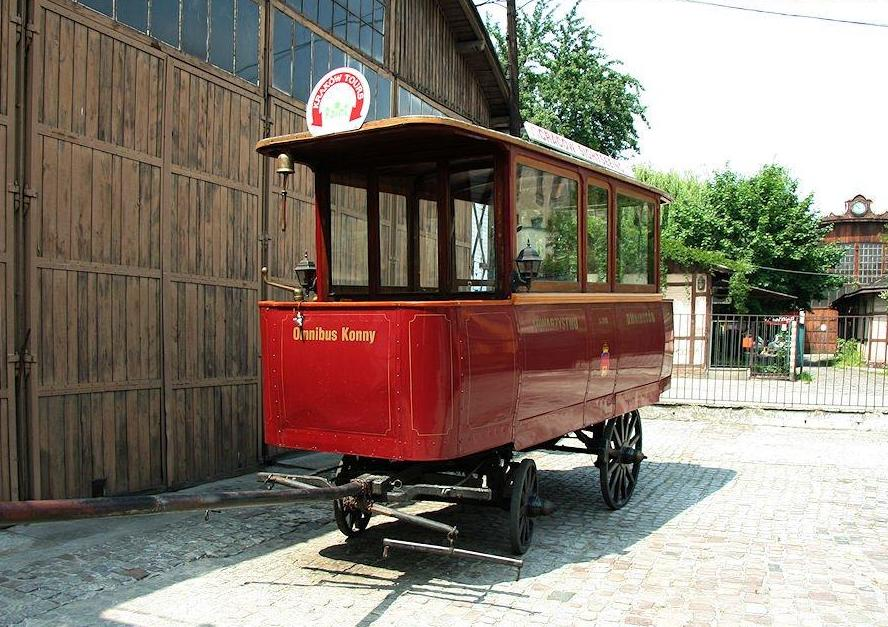 Omnibus konny - odrestaurowany eksponat mojego ulubionego krakowskiego muzeum.